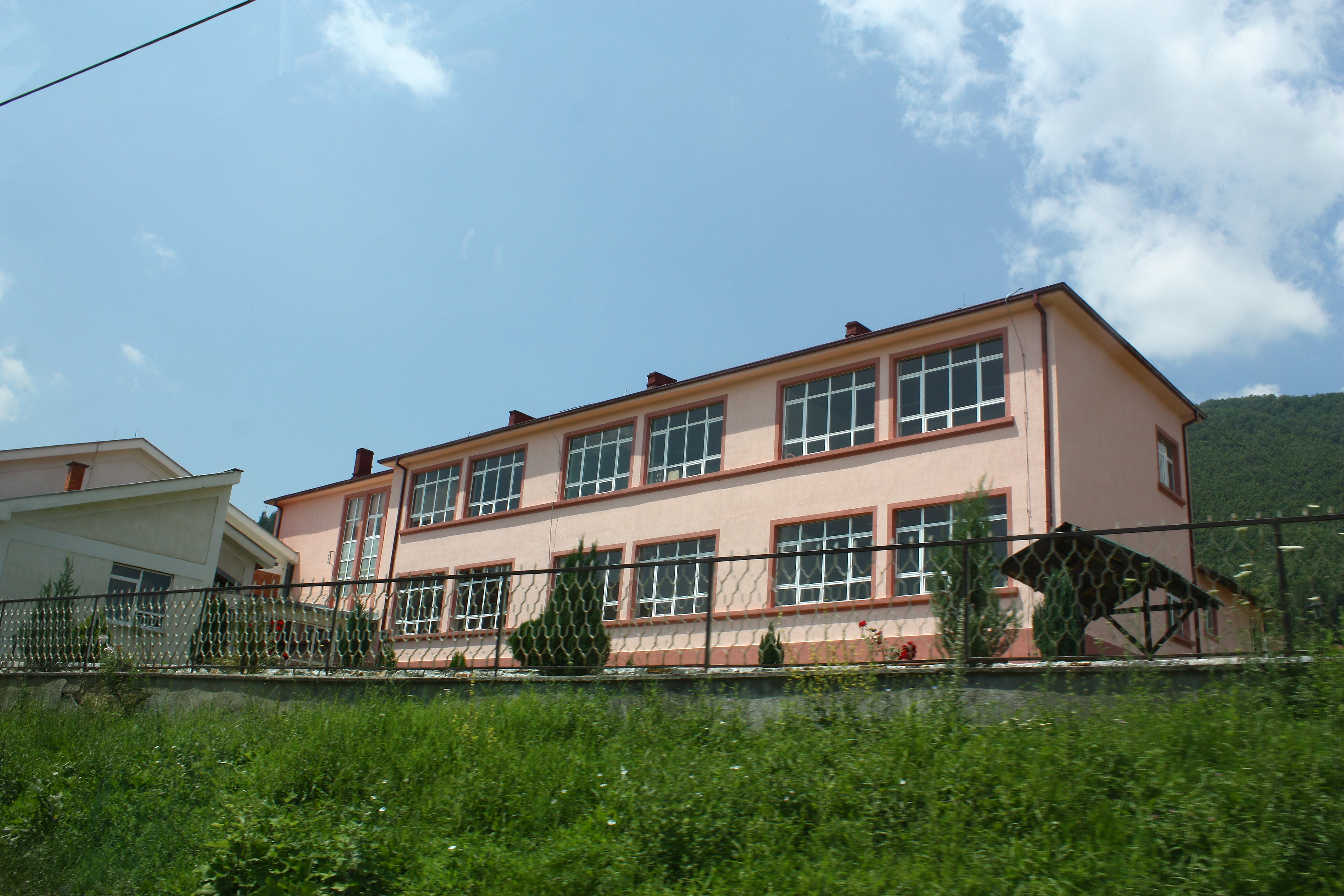 Makedonski Brod